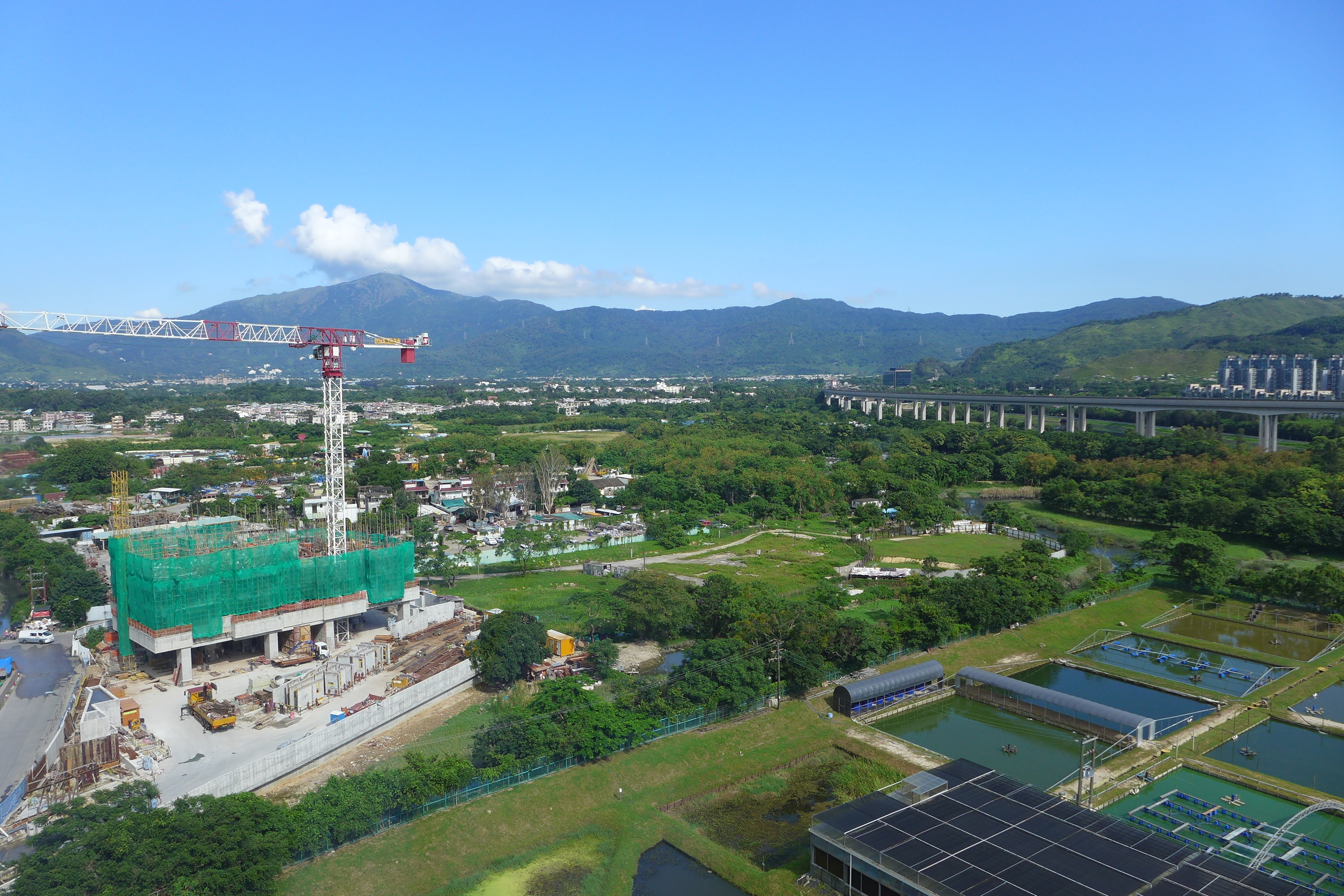 Kam Tin